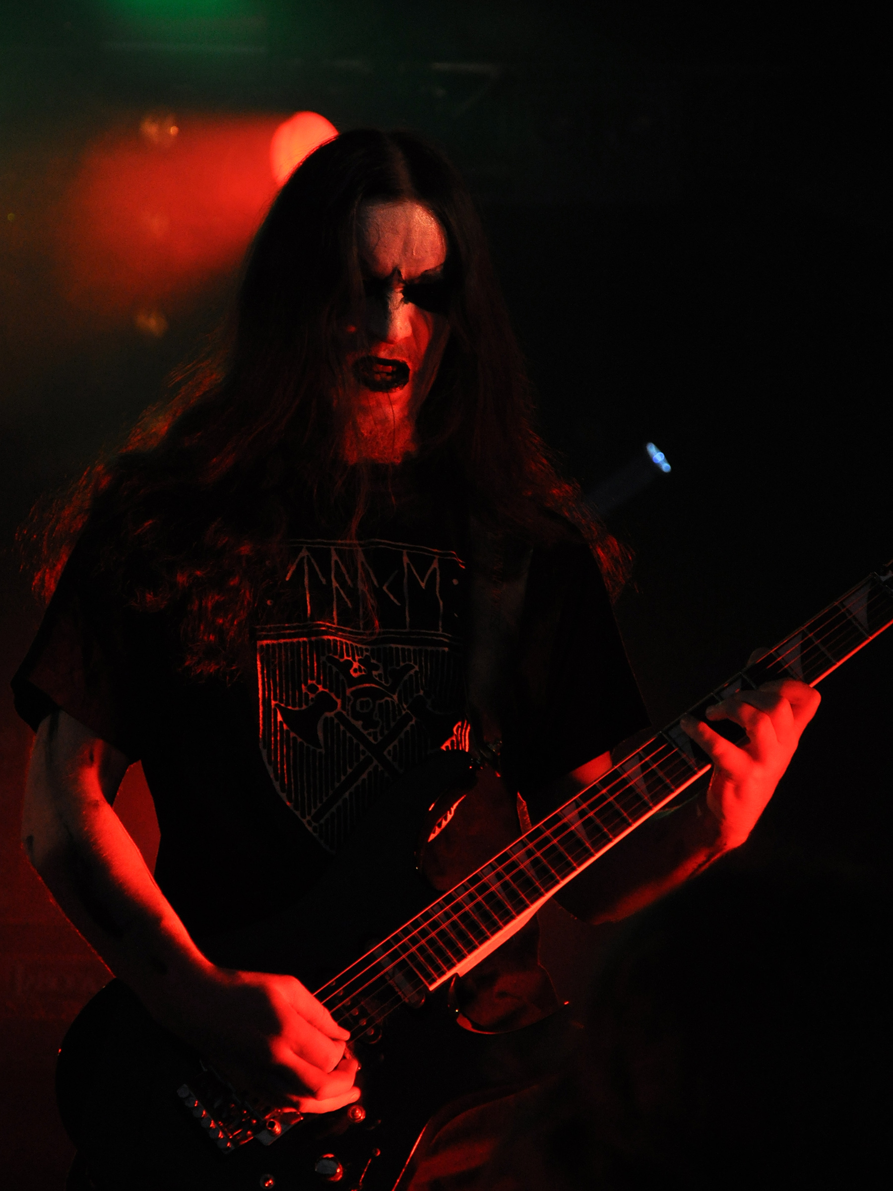 Taake au Metal Méan Festival, le 22 Août 2009: Aindiachai à la guitare.